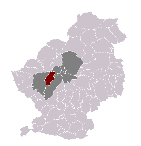 Waziers dans son canton et son arrondissement